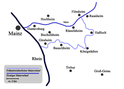 Frühmittelalterlicher Mainverlauf im heutigen Rhein-Main-Gebiet.